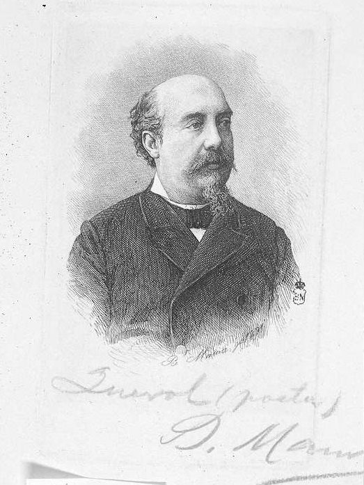 Vicente Wenceslao Querol, aguafuerte, Biblioteca Nacional de España